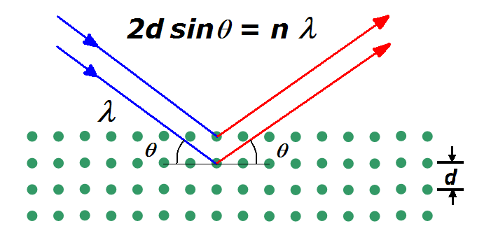 Bragg's law